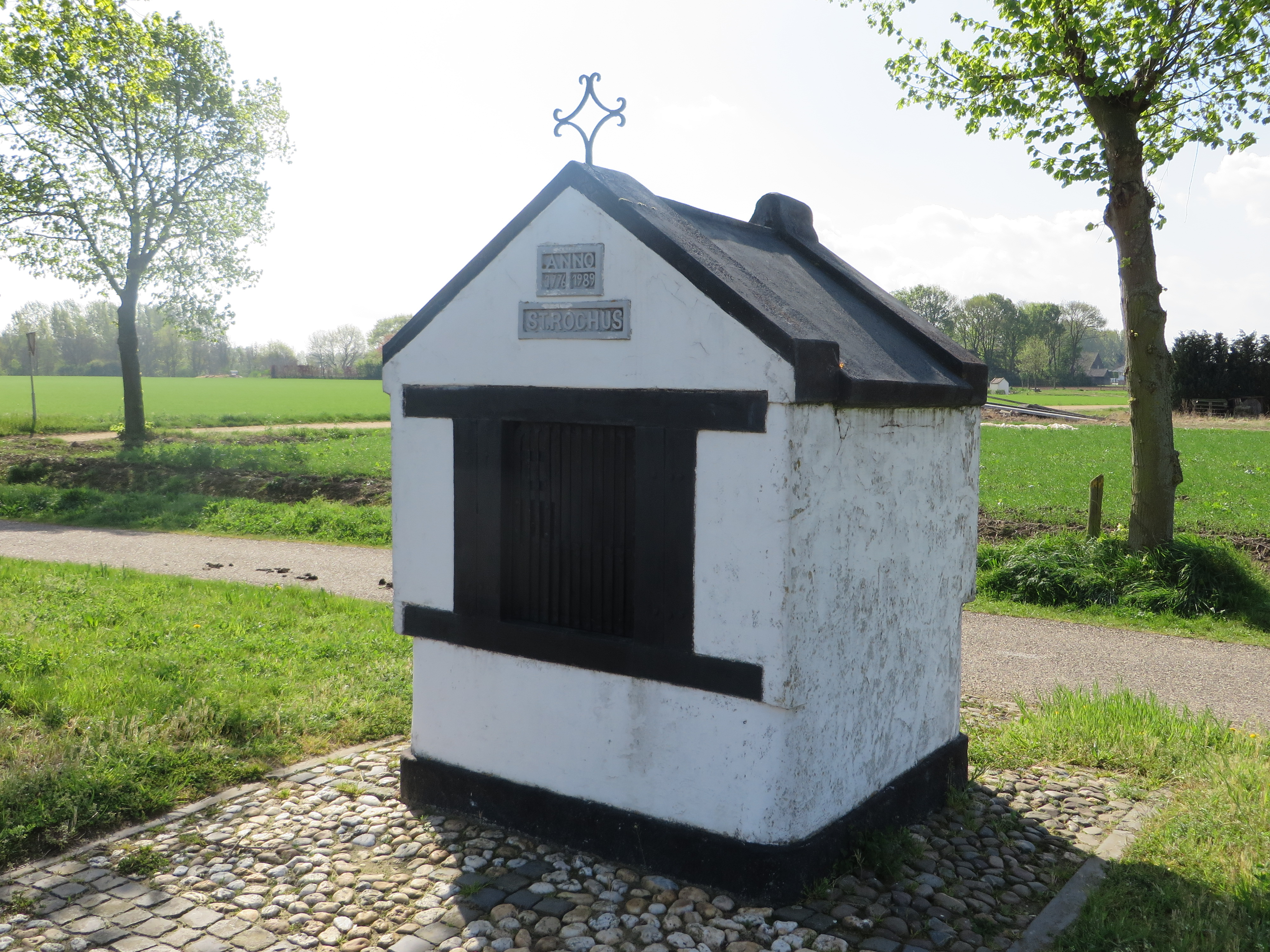 Wegkapel Sint Rochus, Heerbaan, Thorn